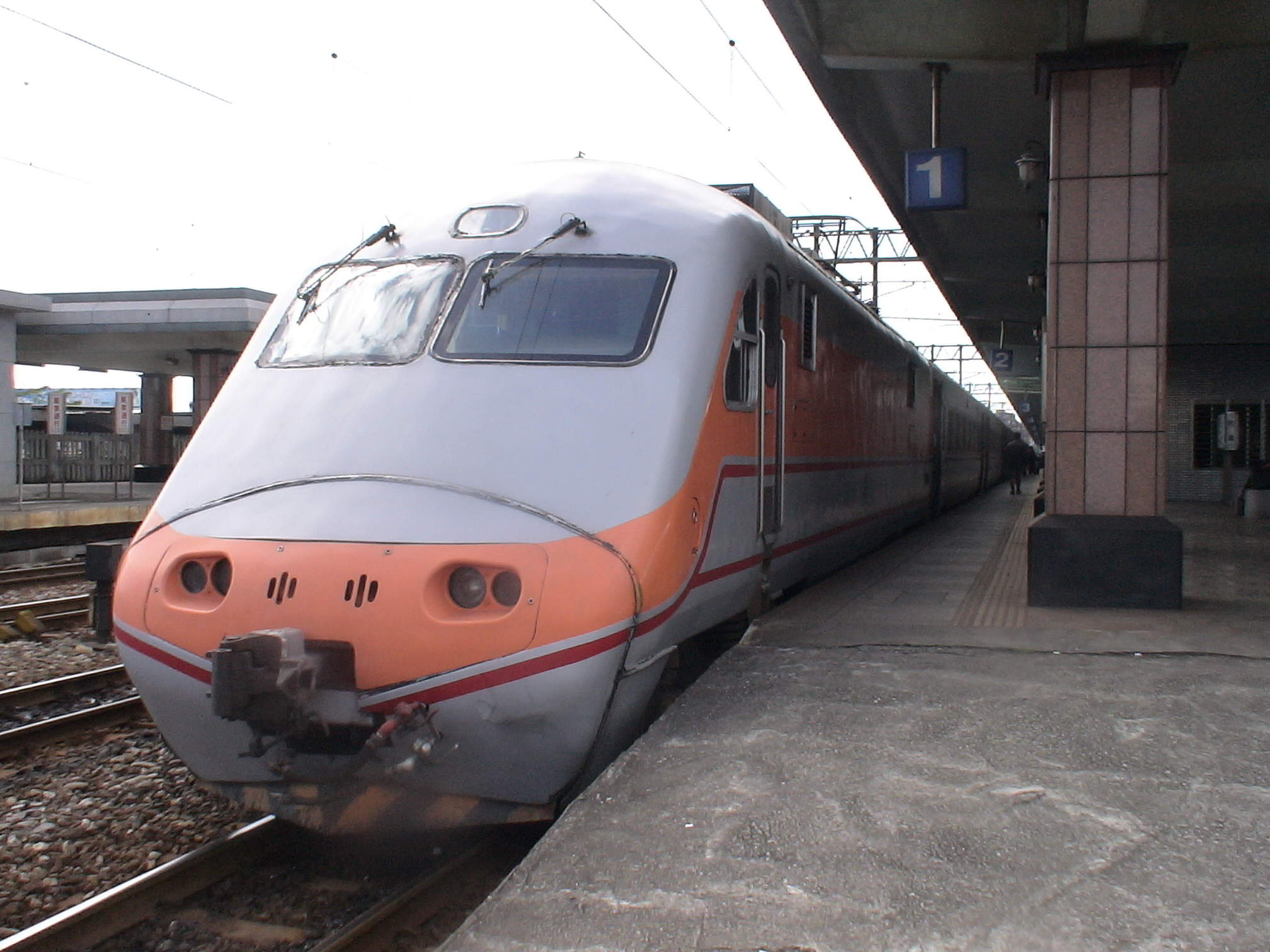 臺灣鐵路管理局自強號E1001於花蓮站。 Bân-lâm-gú: Tī Hua-liân-tsām ê Tsū-kiông-hō E1001. 佇花蓮站的自強號E1001。